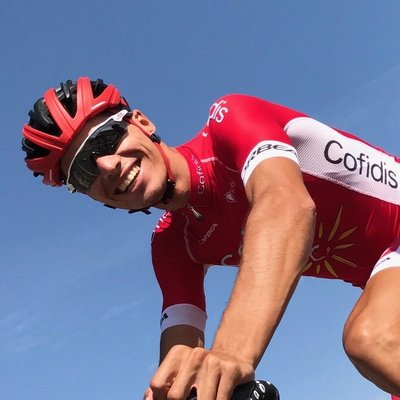 Cycliste professionnel français